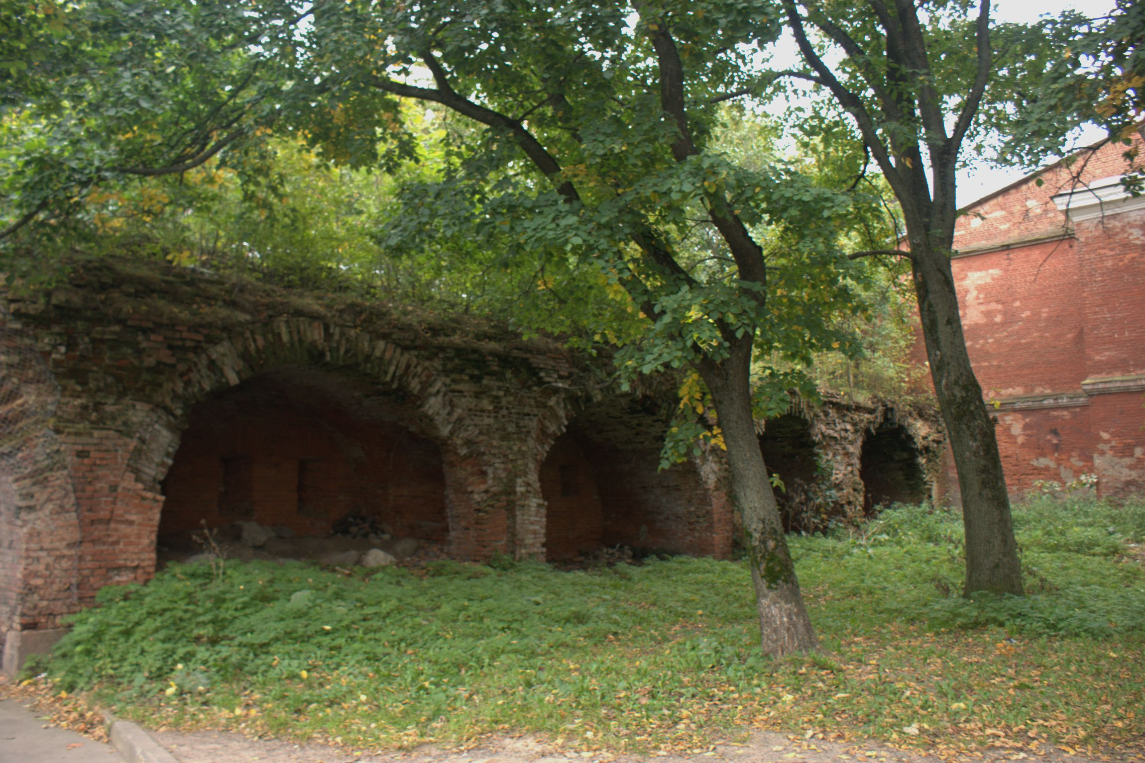 Оборонительная стена: улица Восстания, Кронштадт, Кронштадтский район, Санкт-Петербург